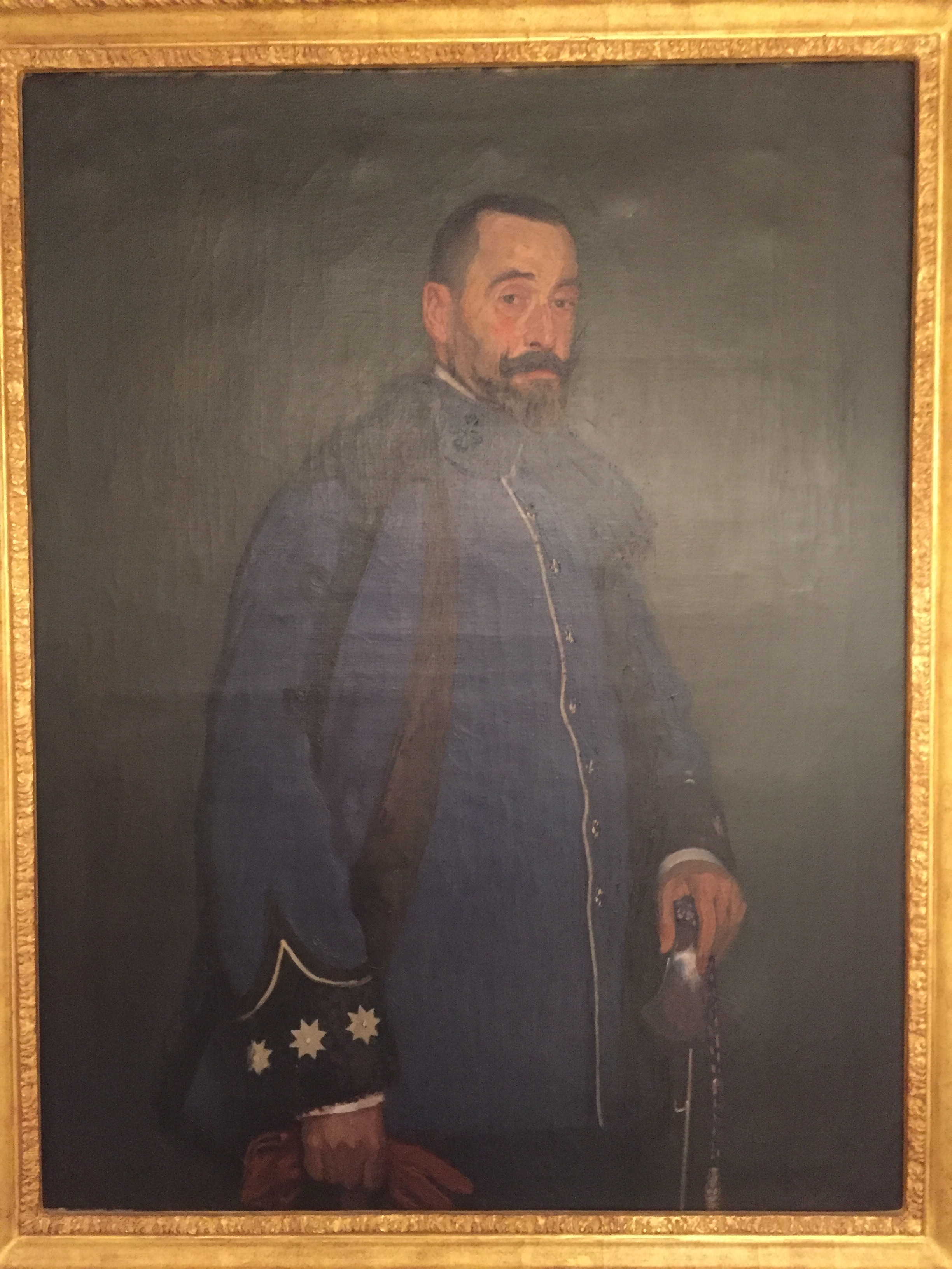 Retrato de Pedro Font de Mora Jáuregui pintado por Ricardo Verde